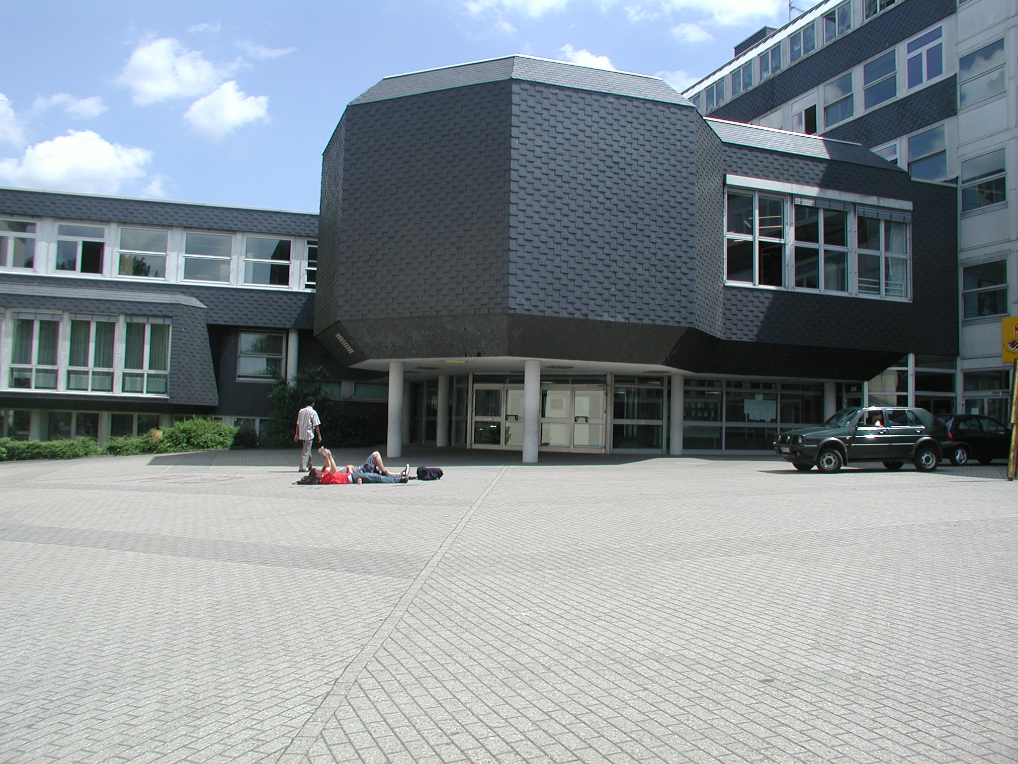 Beschreibung: Haupteingang Engelbert-von-Berg-Gymnasium Wipperfürth) in Wipperfürth Fotograf: Trexer Aufgenommen: 2005 mit OLYMPUS